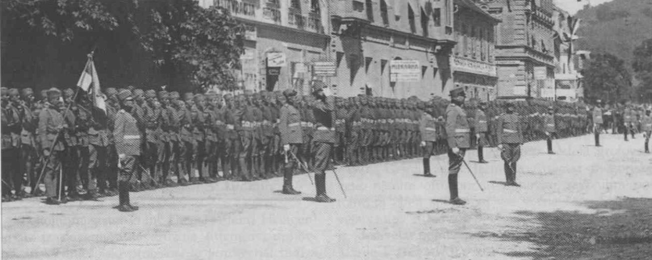 Sprejem zastave 45. pehotnega polka 9. septembra 1930 pred železniško postajo v Mariboru